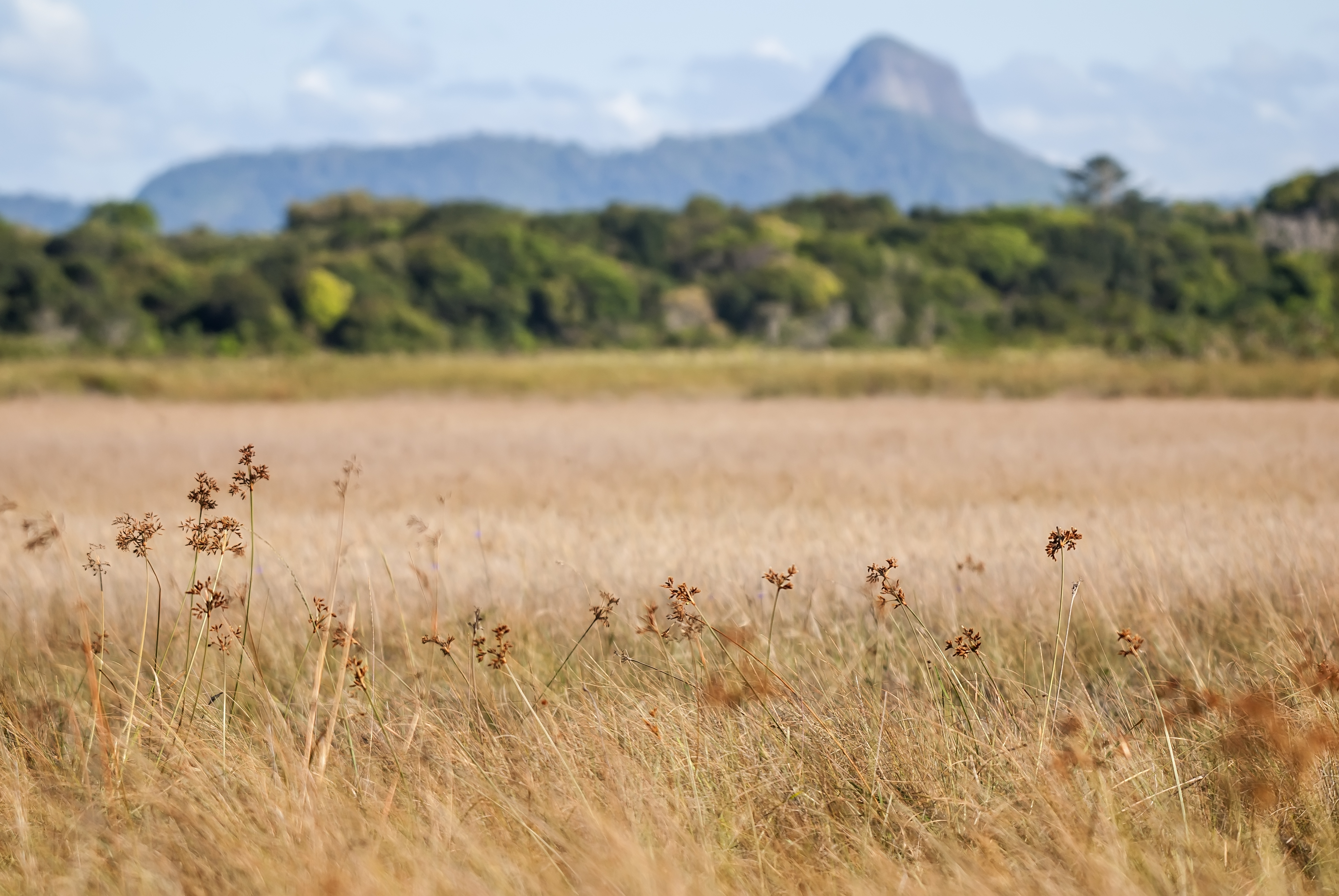 Brejo Herbáceo, e a Mata Seca de Restinga ao fundo, no Parque Estadual Paulo Cesar Vinha (PEPCV), em Guarapari/ES.